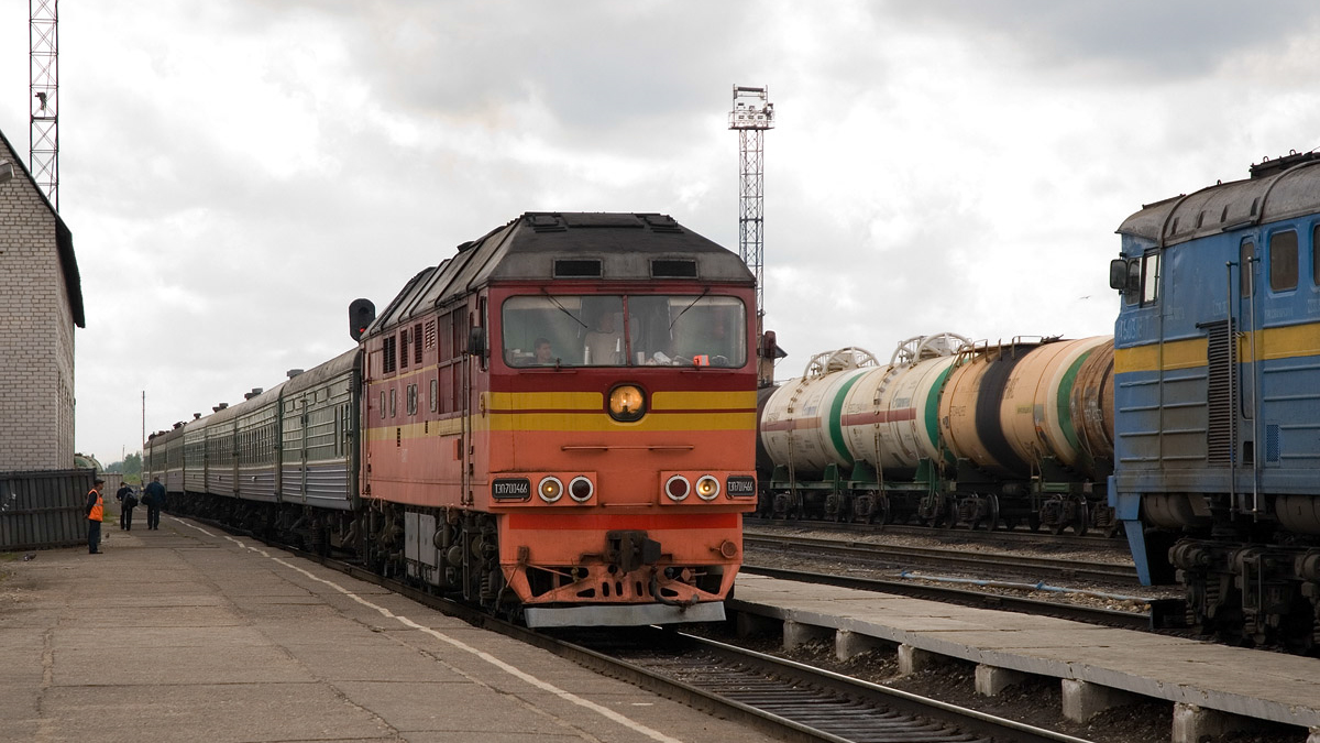 Тепловоз ТЭП70-0466 с поездом Москва - Сыктывкар на станции Микунь